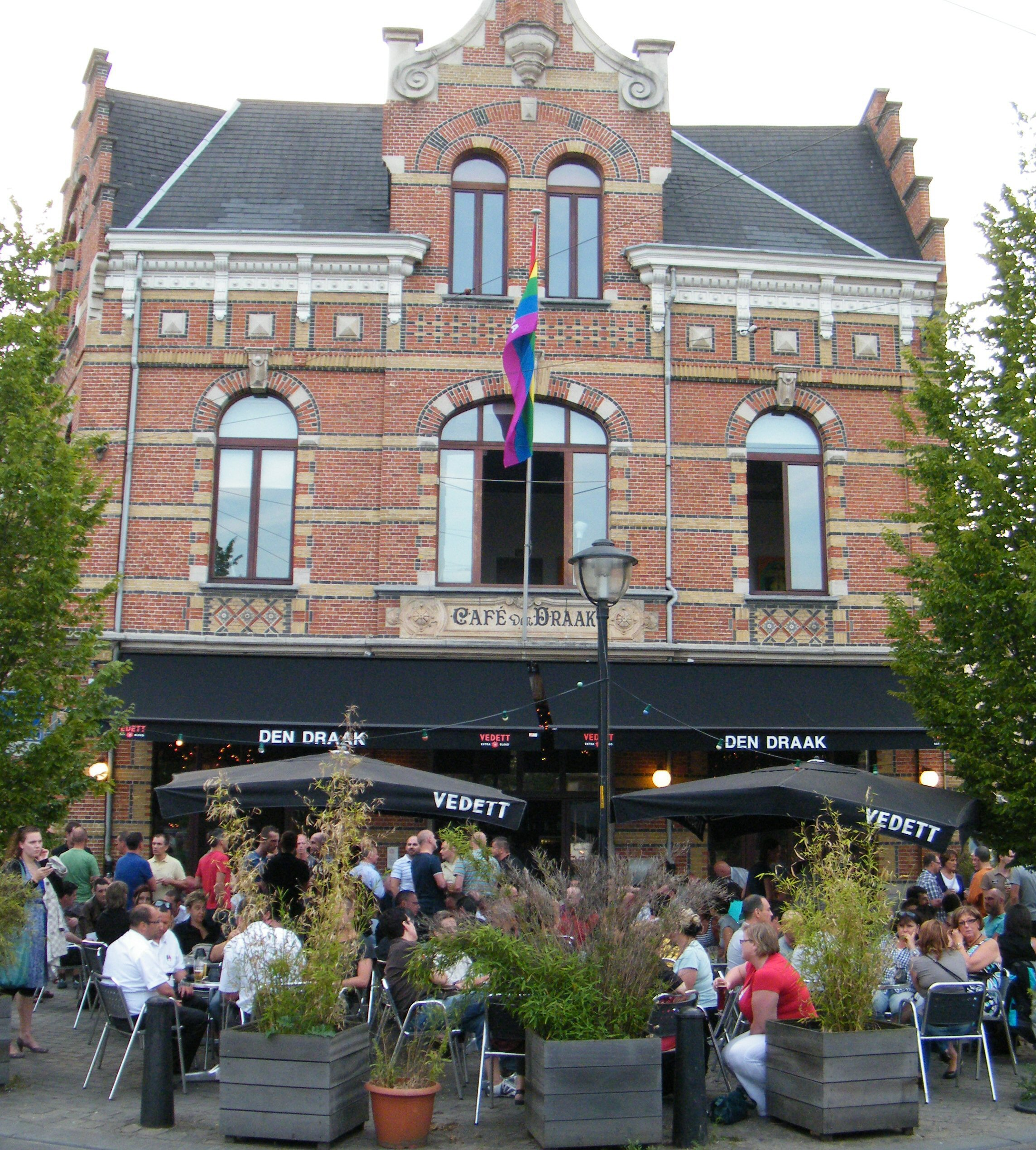 Het Roze Huis Antwerpen en Café Den Draak, in Neo-Vlaamse Renaissance koffie- en burgerhuis van einde 19de eeuw. Draakplaats 1 en Draakstraat 40 , Antwerpen (Zurenborgwijk)